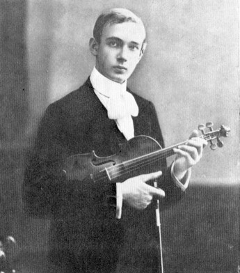 Szigeti József magyar származású hegedűművész, zenepedagógus.